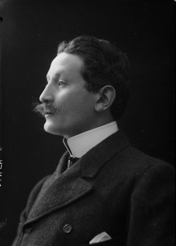 Ciro Galvani fotografato da Mario Nunes Vais